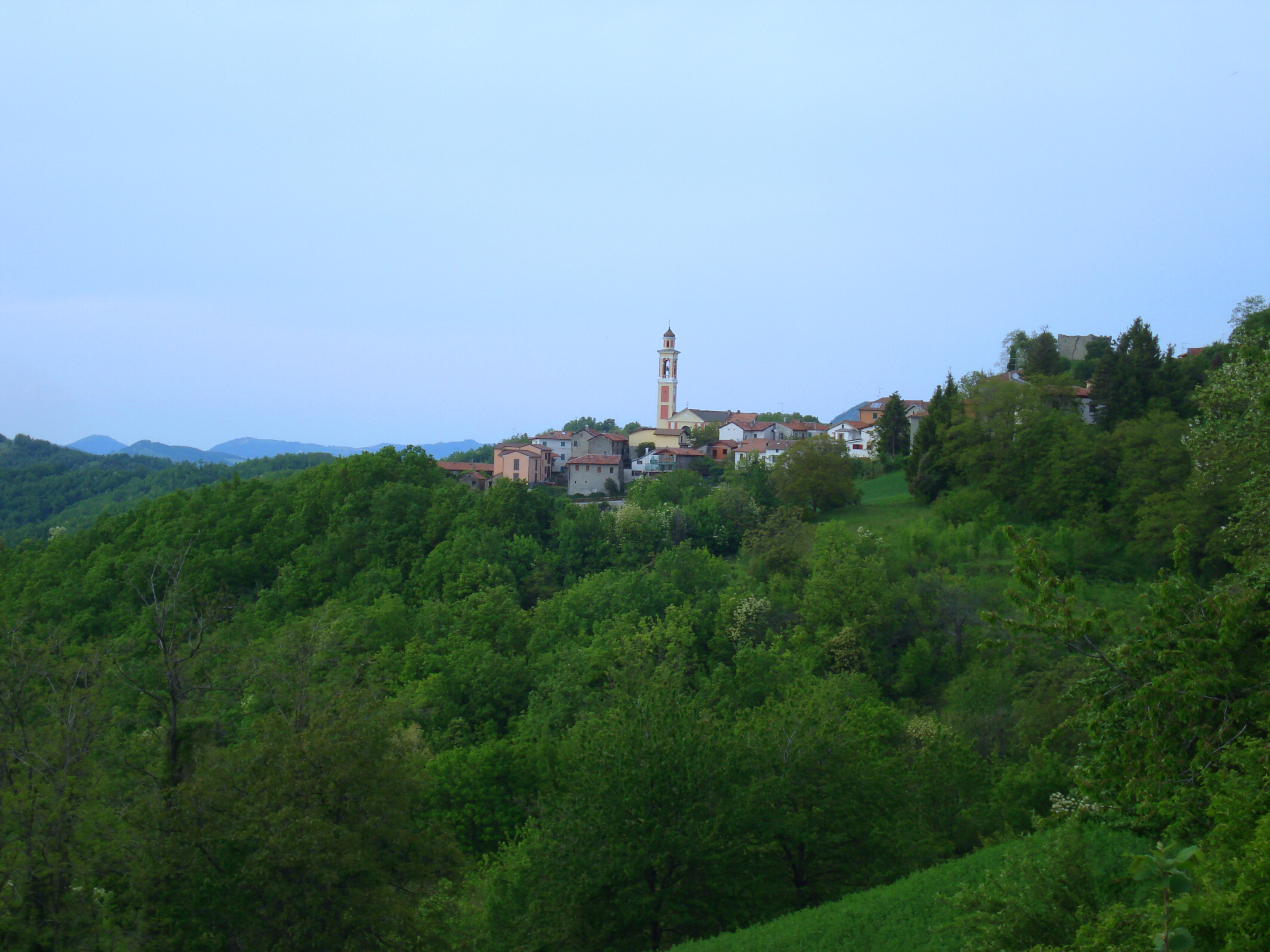 Dernice (provincia di Alessandria): panorama